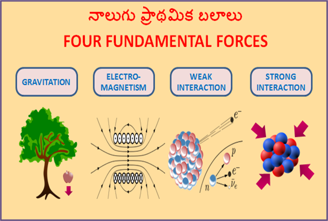 నాలుగు ప్రాథమిక బలాలు